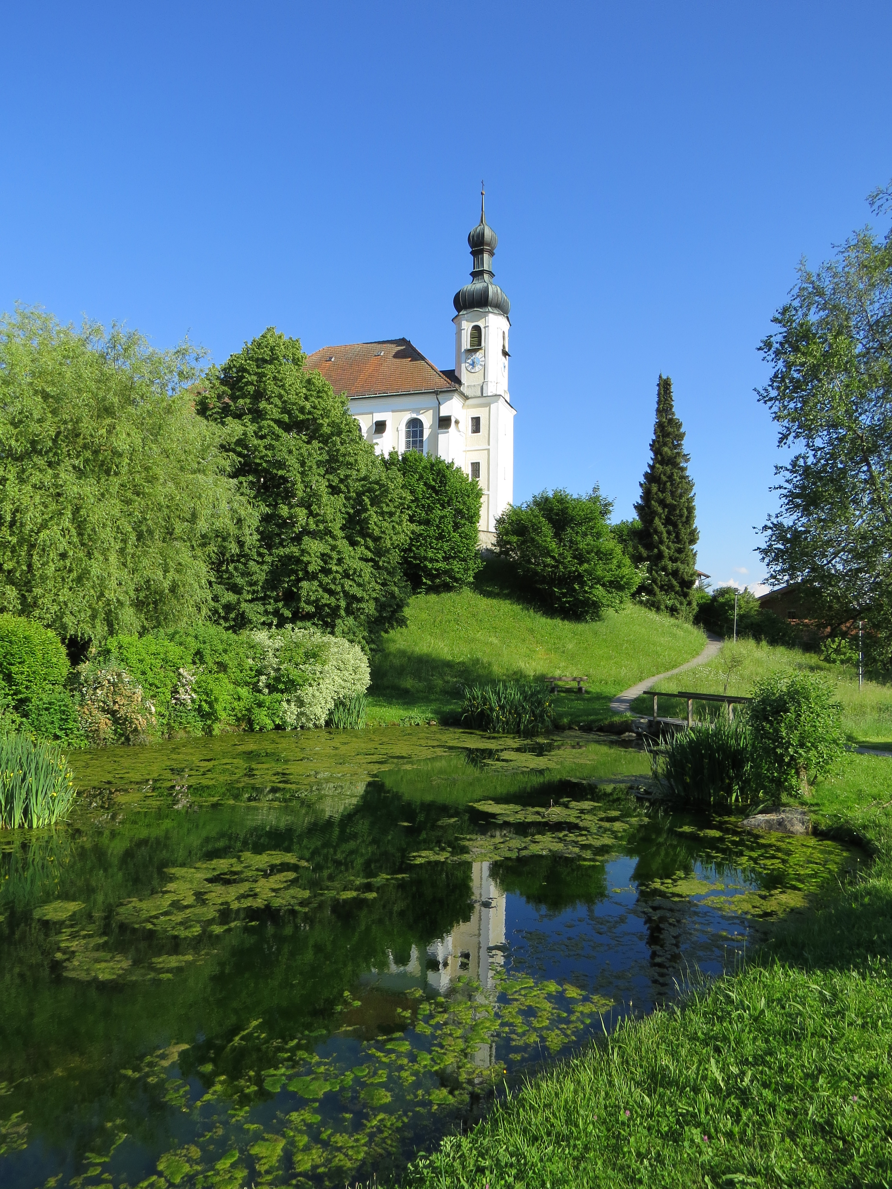 Kirche St. Johann Baptist und St. Johann Evangelist und Dorfweiher in Breitbrunn am Chiemsee